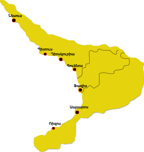 map of Kolkhida